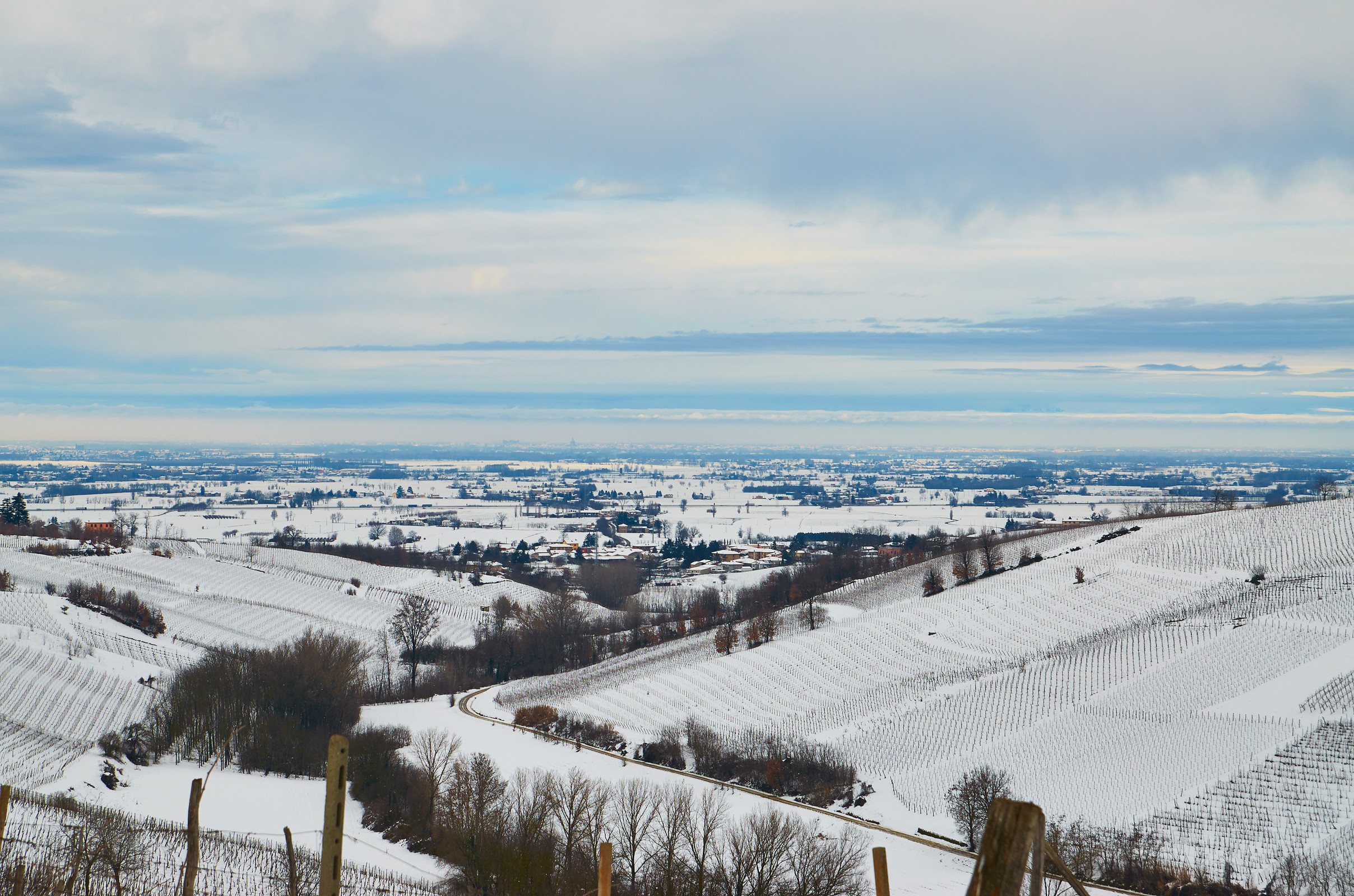 Vista verso Pavia